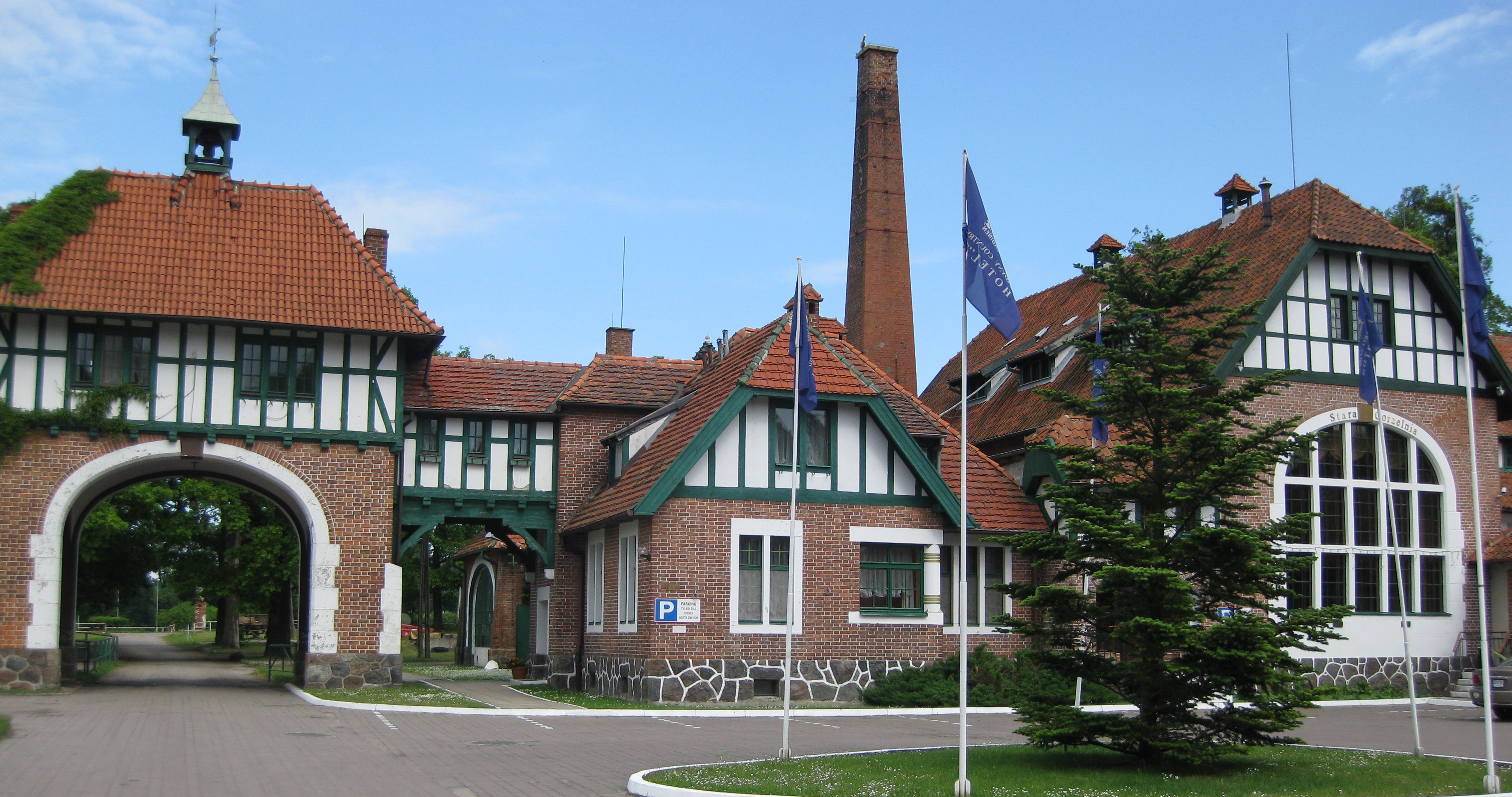 Gebäude zum ehemaligen Schloss Cadinen in Kadyny gehörig, früher Cadinen, Polen